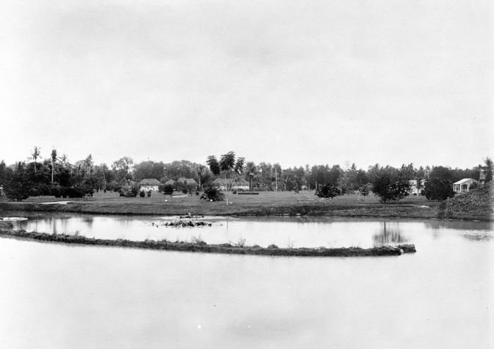 Foto. Vijver in de tuin Sriwadari te Soerakarta.